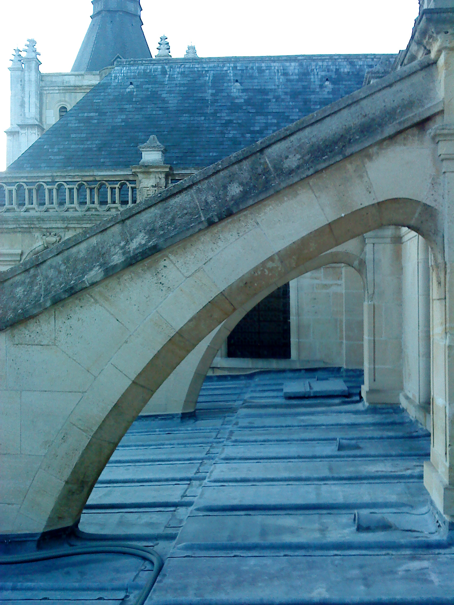 Arc-boutants, sur la terrasse sud (en plomb après les travaux de 2004), au niveau du choeur, après le transept.